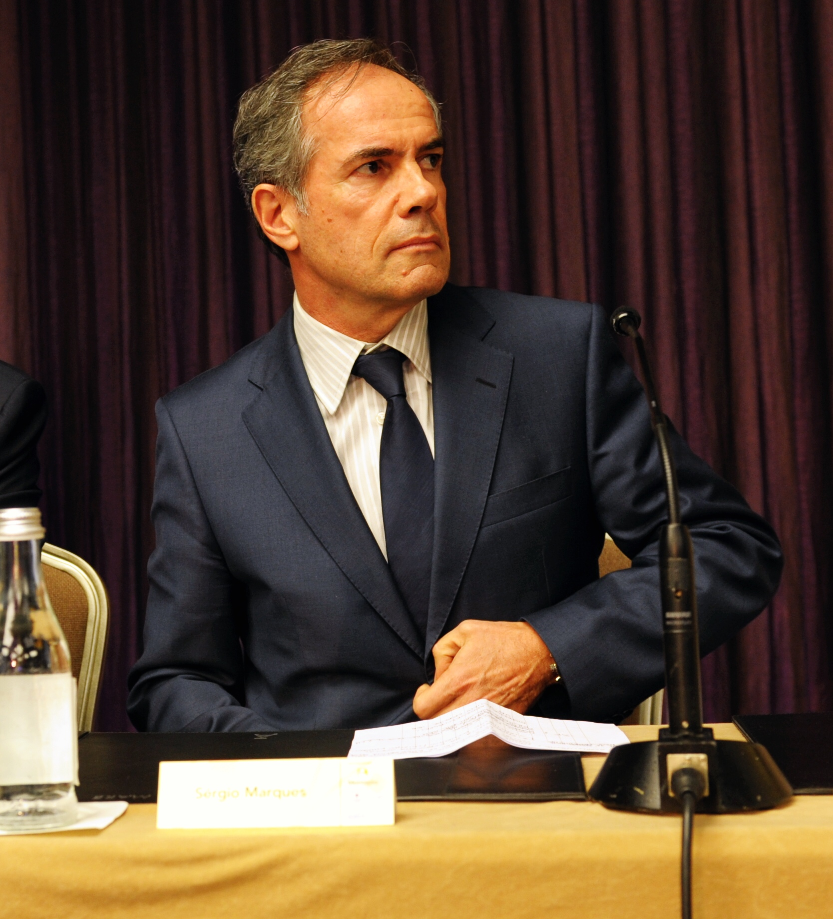 Conferência